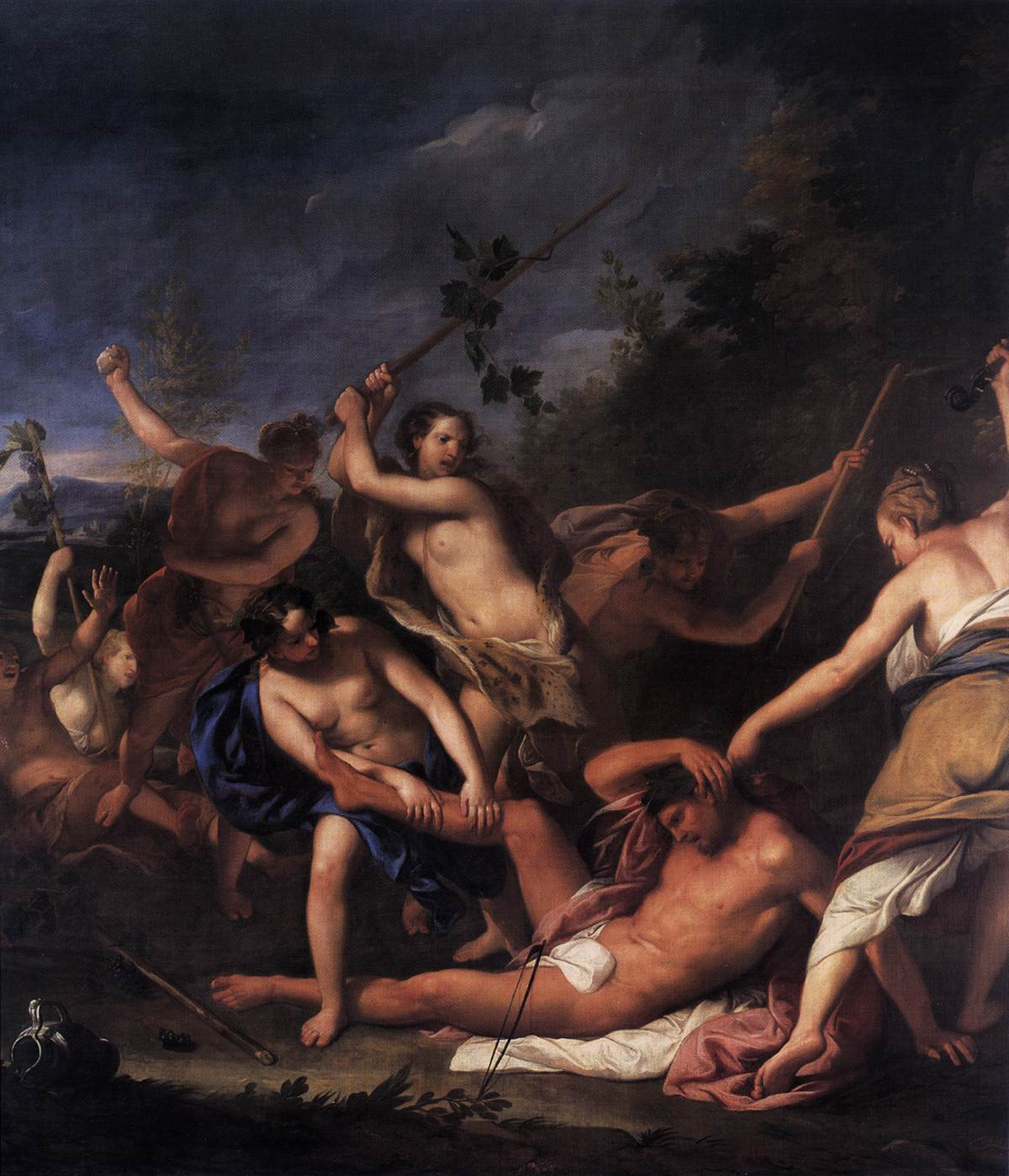 (detail)